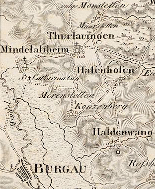 Ausschnitt von "Charte von Schwaben. Blatt 26 [Burgau]" von Charte von Schwaben Tafel 26 Burgau